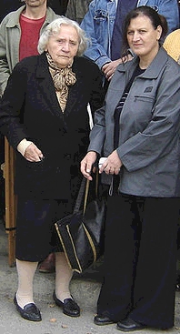 Etelka Kukurić, slikarica iz Darde s Radom Marković na likovnoj koloniji Đola 2004.